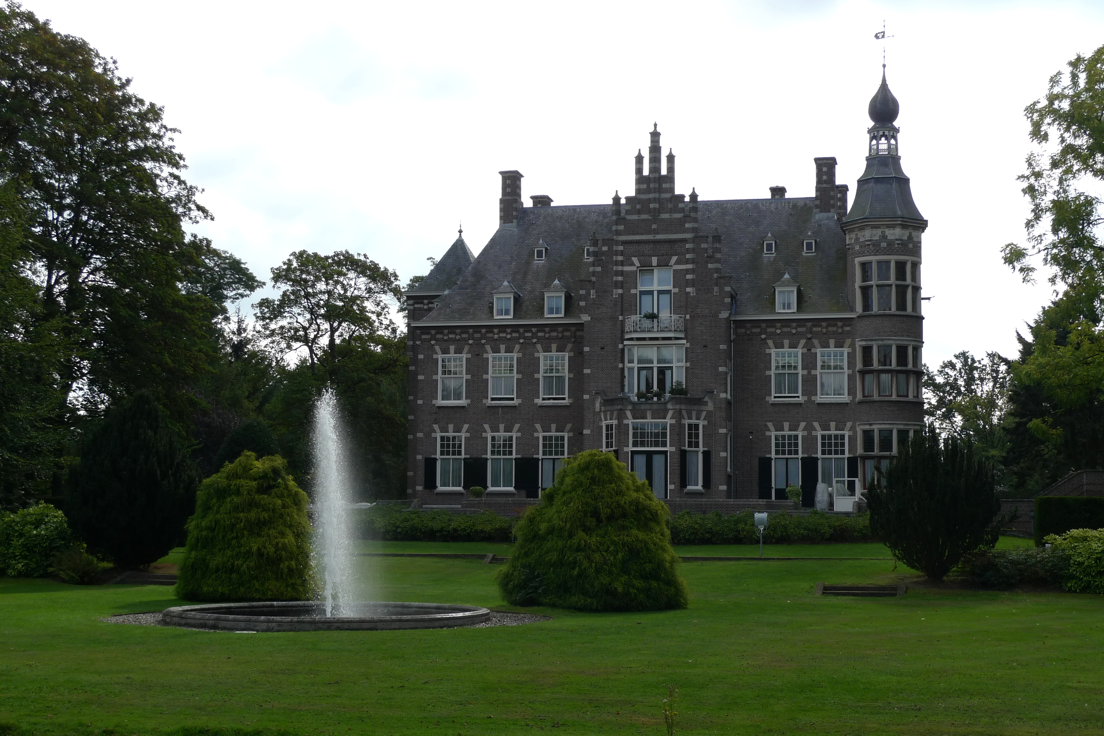 Landhuis De Burgh in Eindhoven, Nederlands rijksmonument nr. 518783